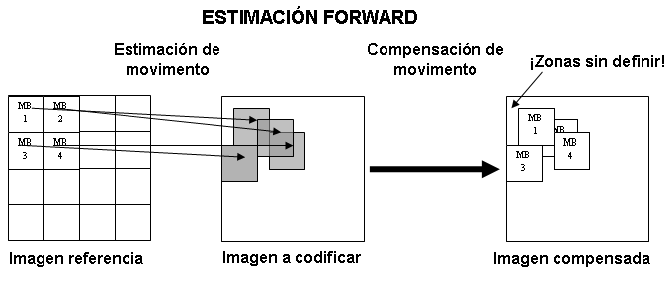 Esquema hecho en word para entender mejor el concepto